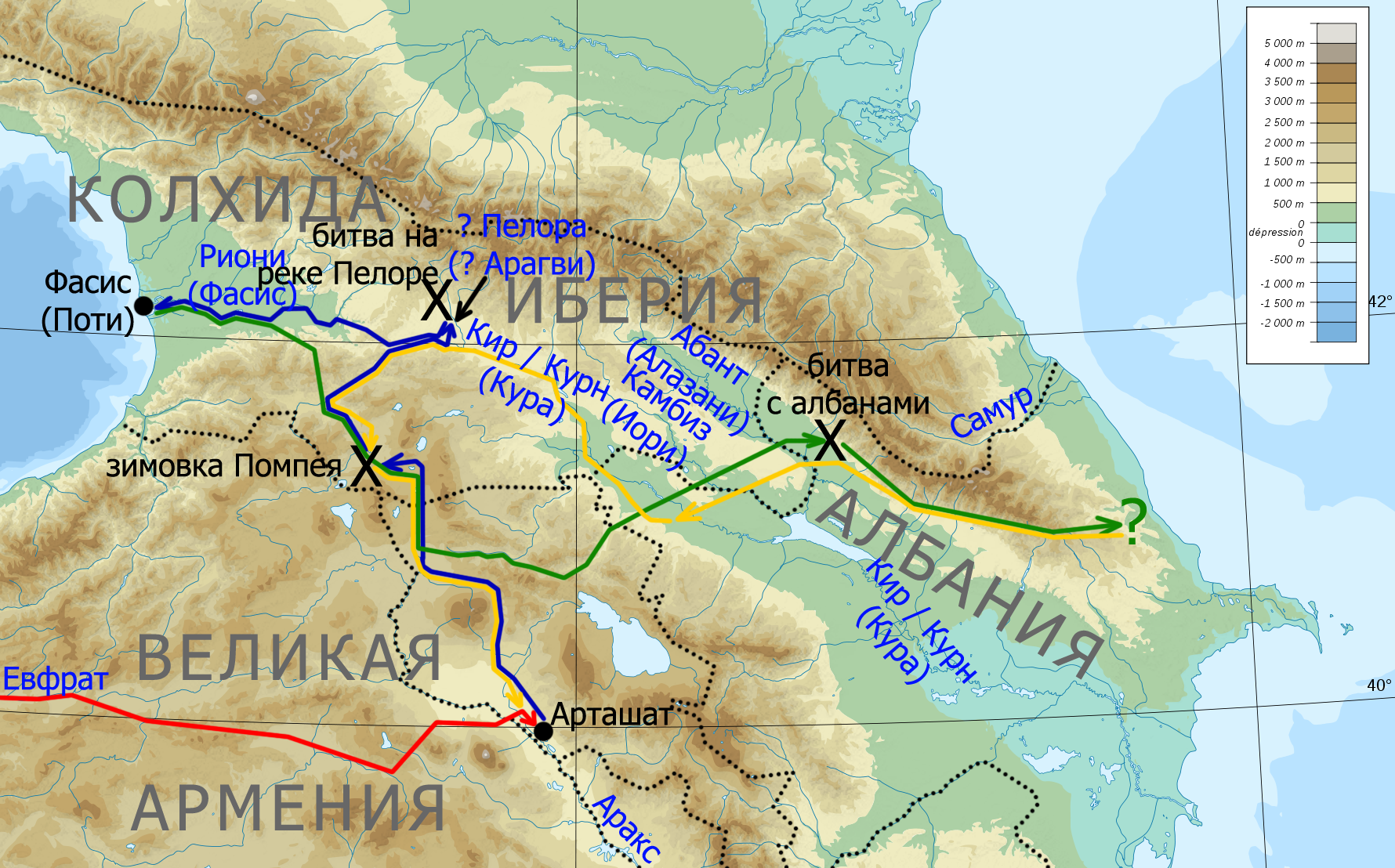 Путь Гнея Помпея во время похода на Кавказ (66-64 гг. до н. э.). Картографическая основа: File:Armenian Empire-ru.png for version 1.0; File:Caucasus topo map-blank.svg for version 2.0. Реконструкция пути выполнена по статье: Манандян Я. А. Круговой путь Помпея в Закавказье // Вестник древней истории. — 1939, № 4. — С. 70—82. Никополь — Арташат. Арташат — Иберия — Фасис. Фасис — Албания. Албания — Арташат.